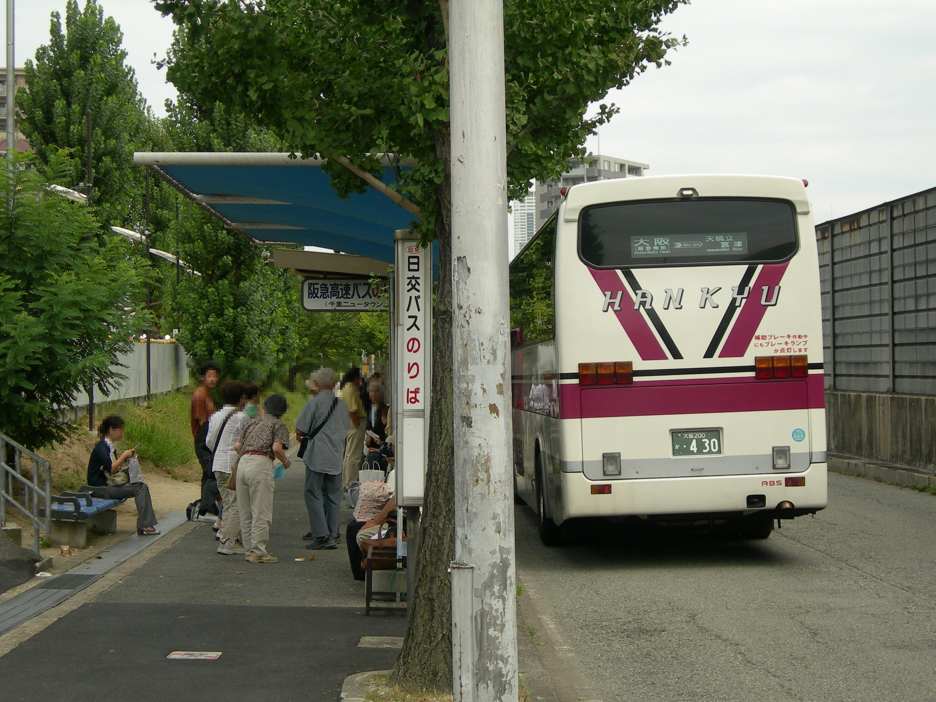 高速バス 「千里ニュータウン」停留所